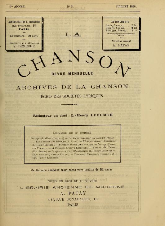 Couverture du numéro 3 de la revue La Chanson.